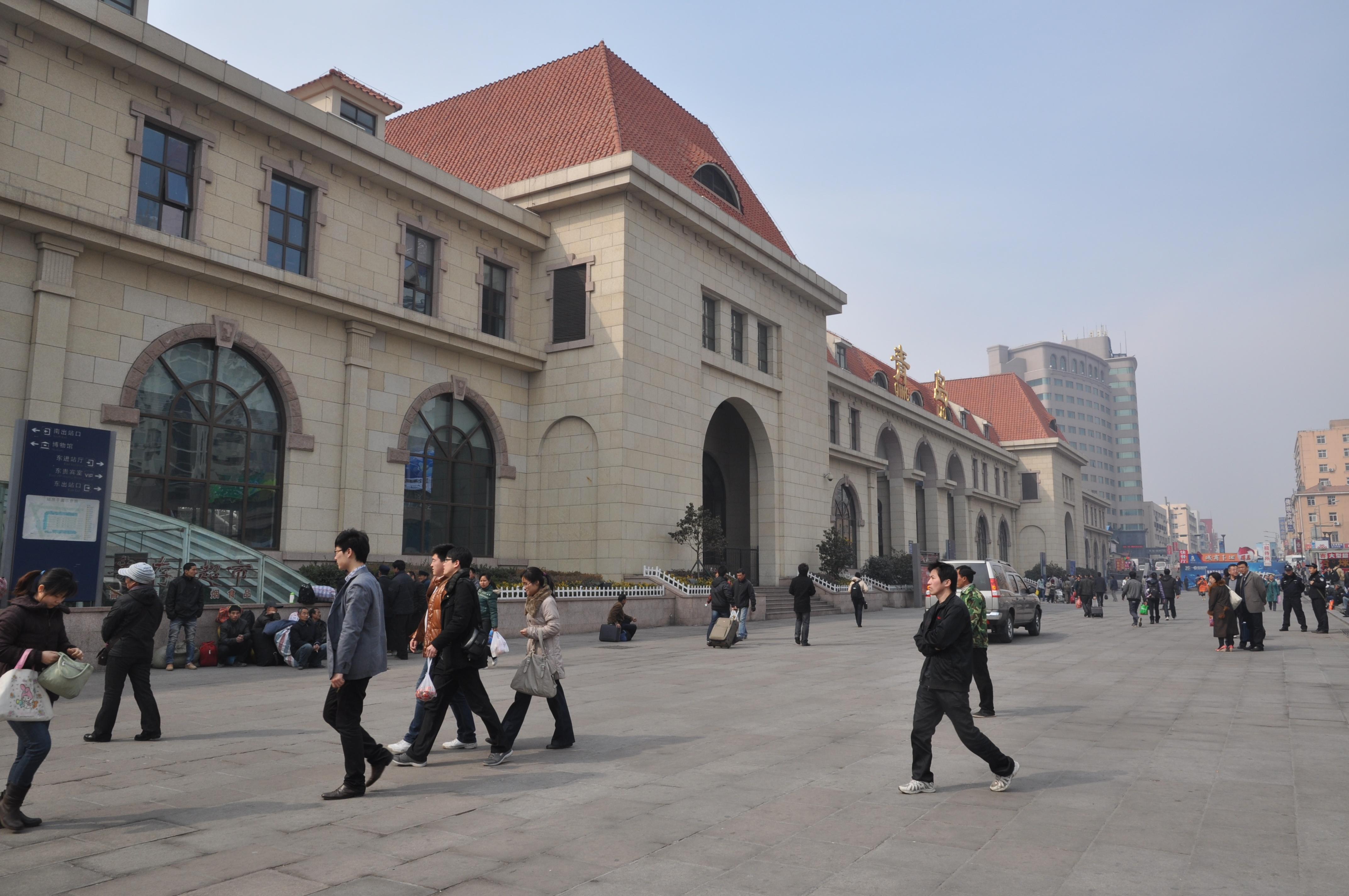 青岛站东侧